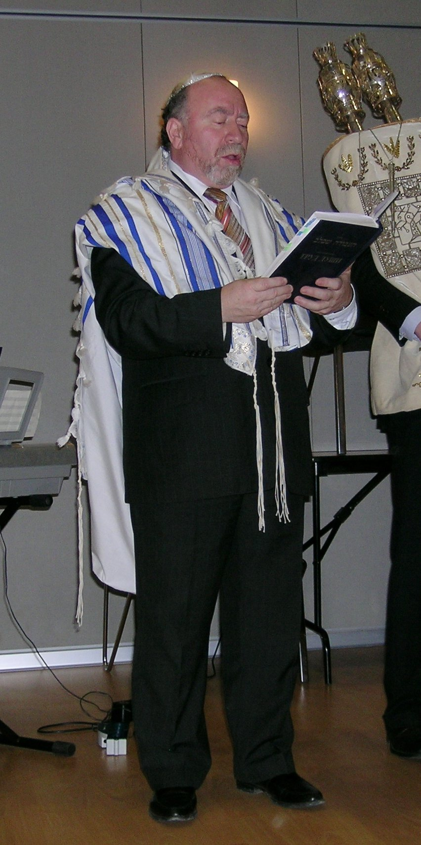 Финкельштейн Борис Янкелевич Барух Финкельштейн Baruh Finkelshtein ben Yankel 2008 год